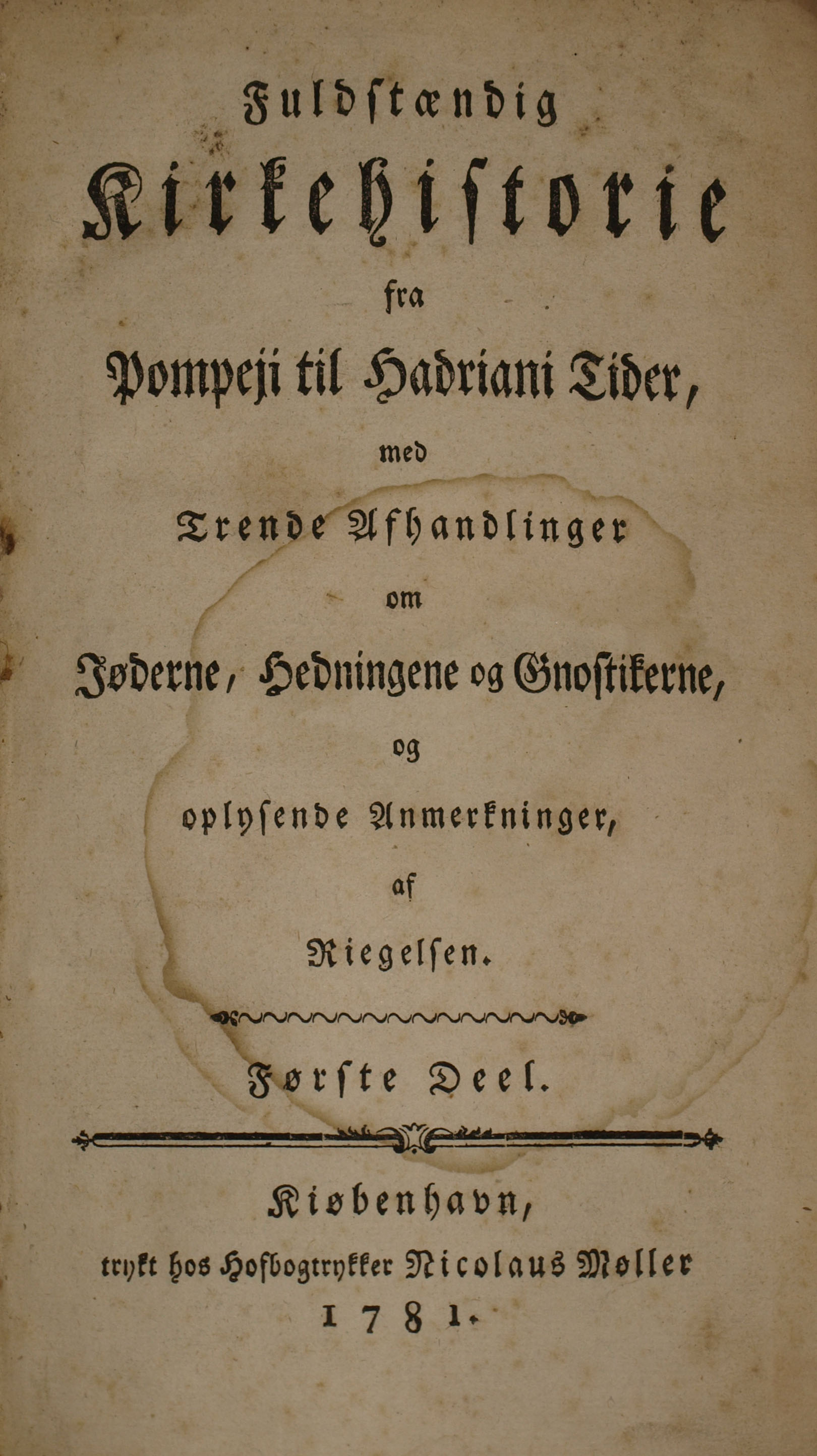 Titelbladet til første bind af Niels Ditlev Riegels' Fuldstændig Kirkehistorie fra Pompeji til Hadriani Tider, med Trende Afhandlinger om Jøderne, Hedningene og Gnostikerne og oplysende Anmerkninger fra 1781.